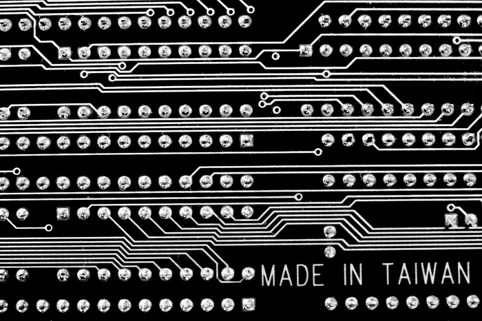 Circuit imprimé